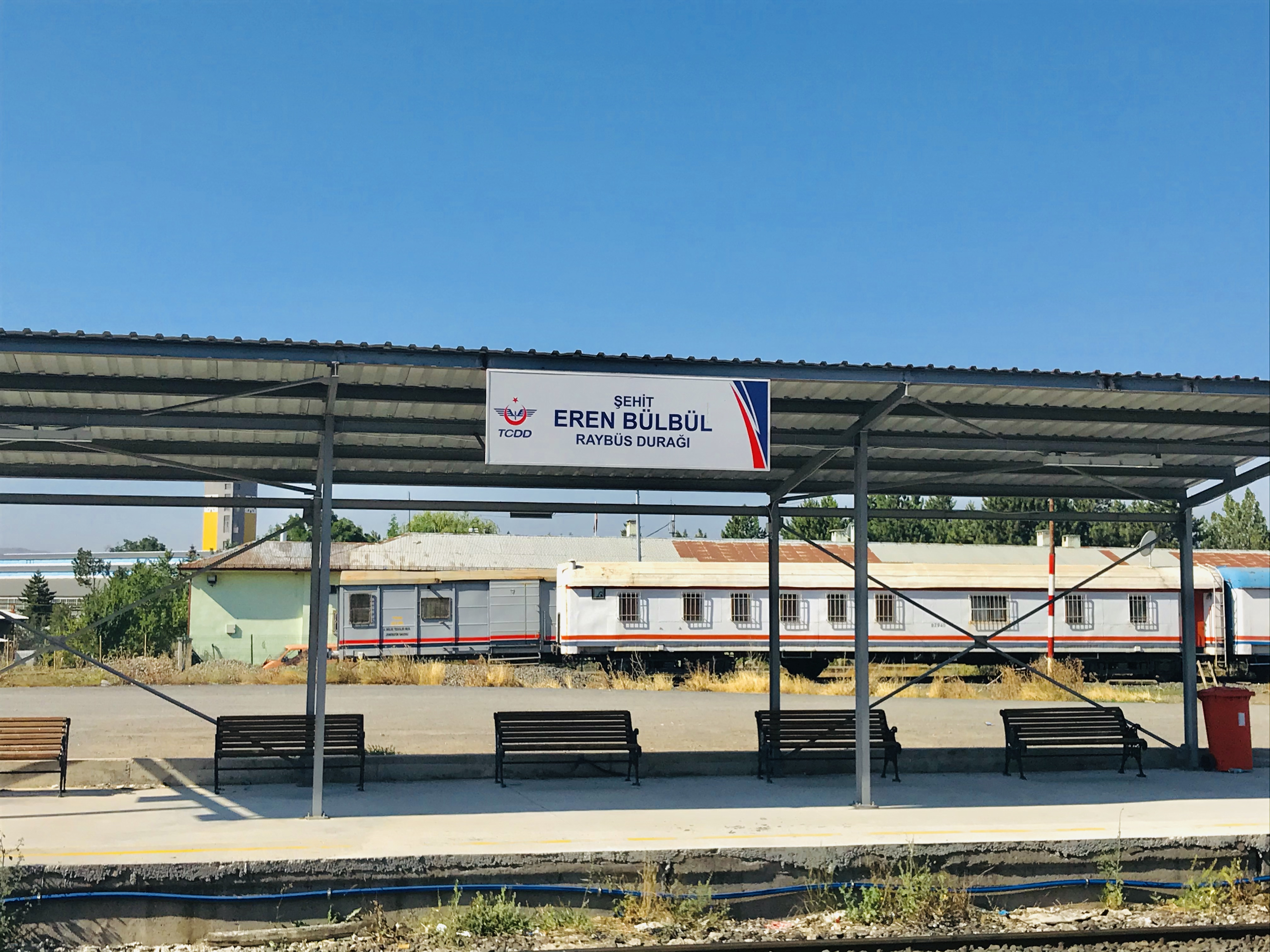 Eren Bülbül Raybüs İstasyonu, Sivas, Türkiye.